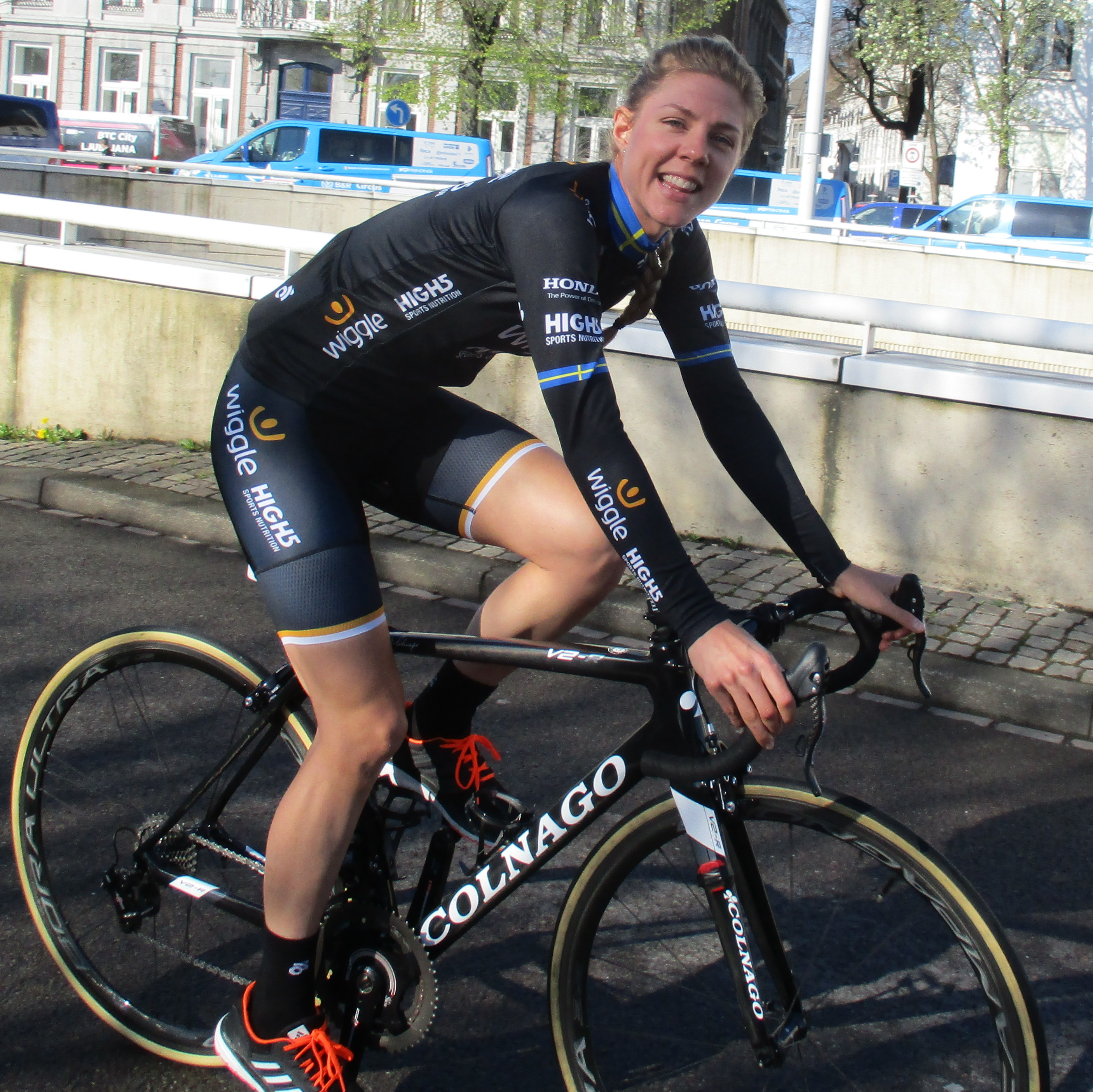 Start van de Amstel Gold Race Ladies Edition 2018 in Maastricht.